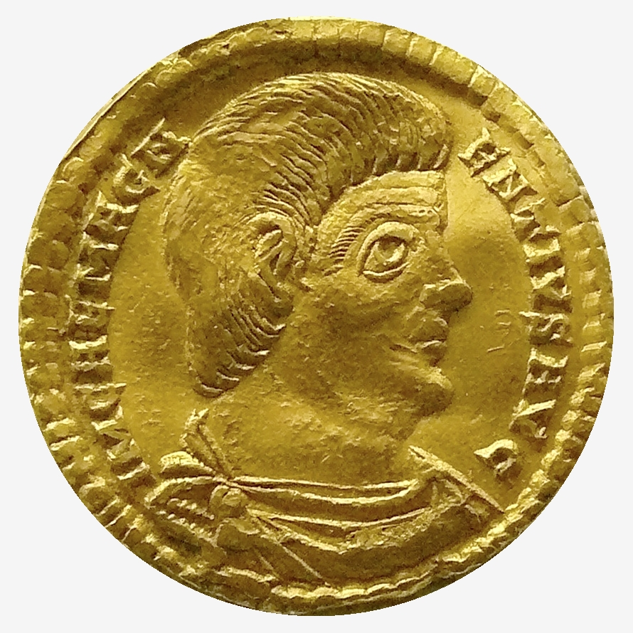 Solidus d'or de Magnence (350-353) atelier de Trèves - Musée d"archéologie nationale de Saint-Germain-en-Laye, Inv n° 2812 N